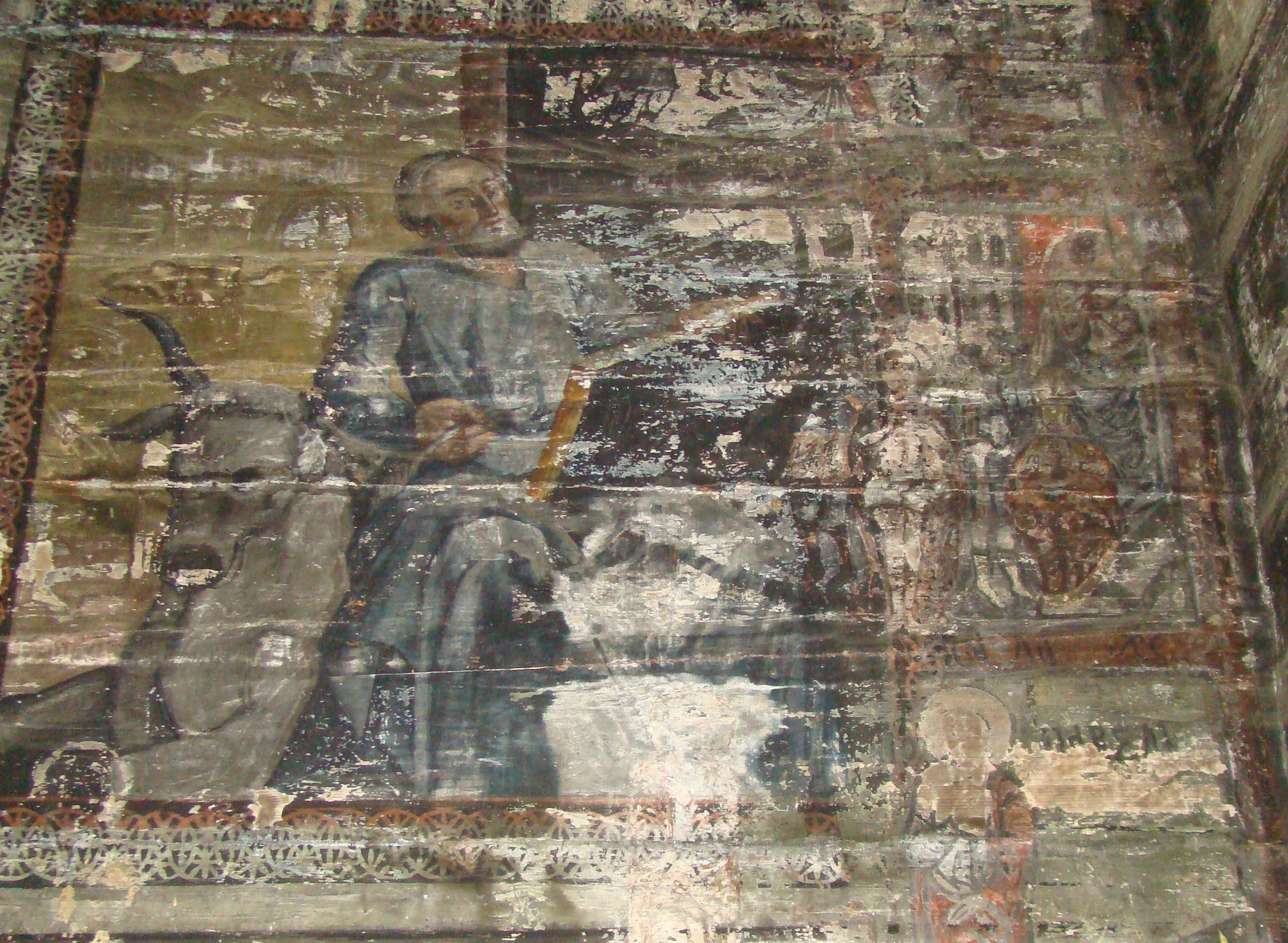 Biserica de lemn "Sfântul Nicolae" (a Nistoreştilor) , oraş SĂLIŞTEA DE SUS